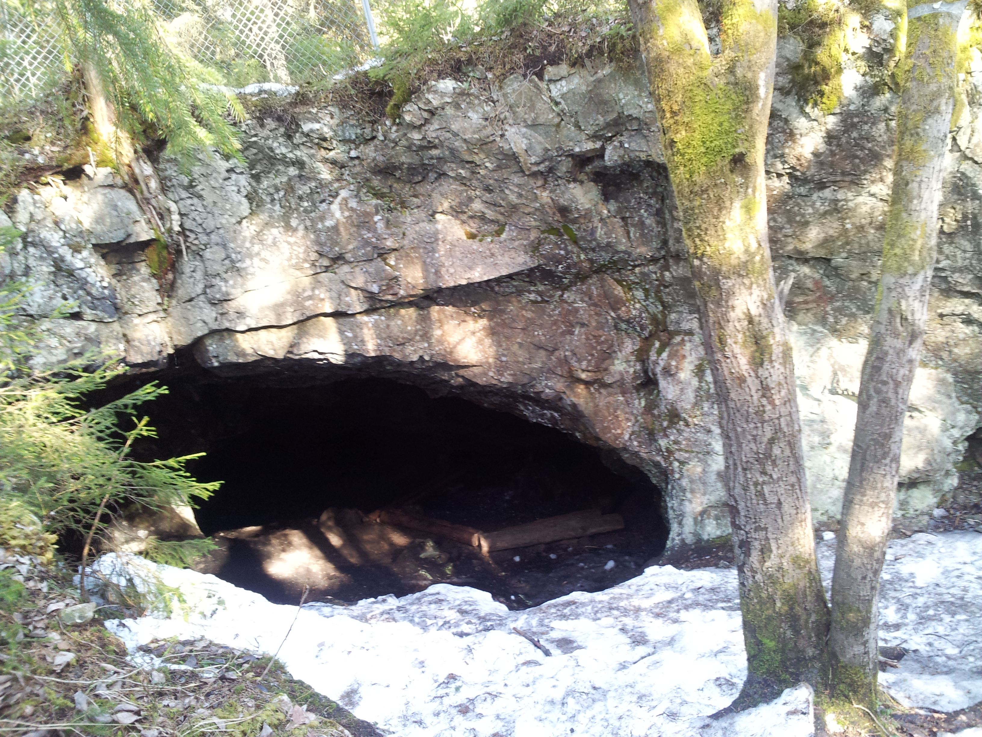 Sogn gruve